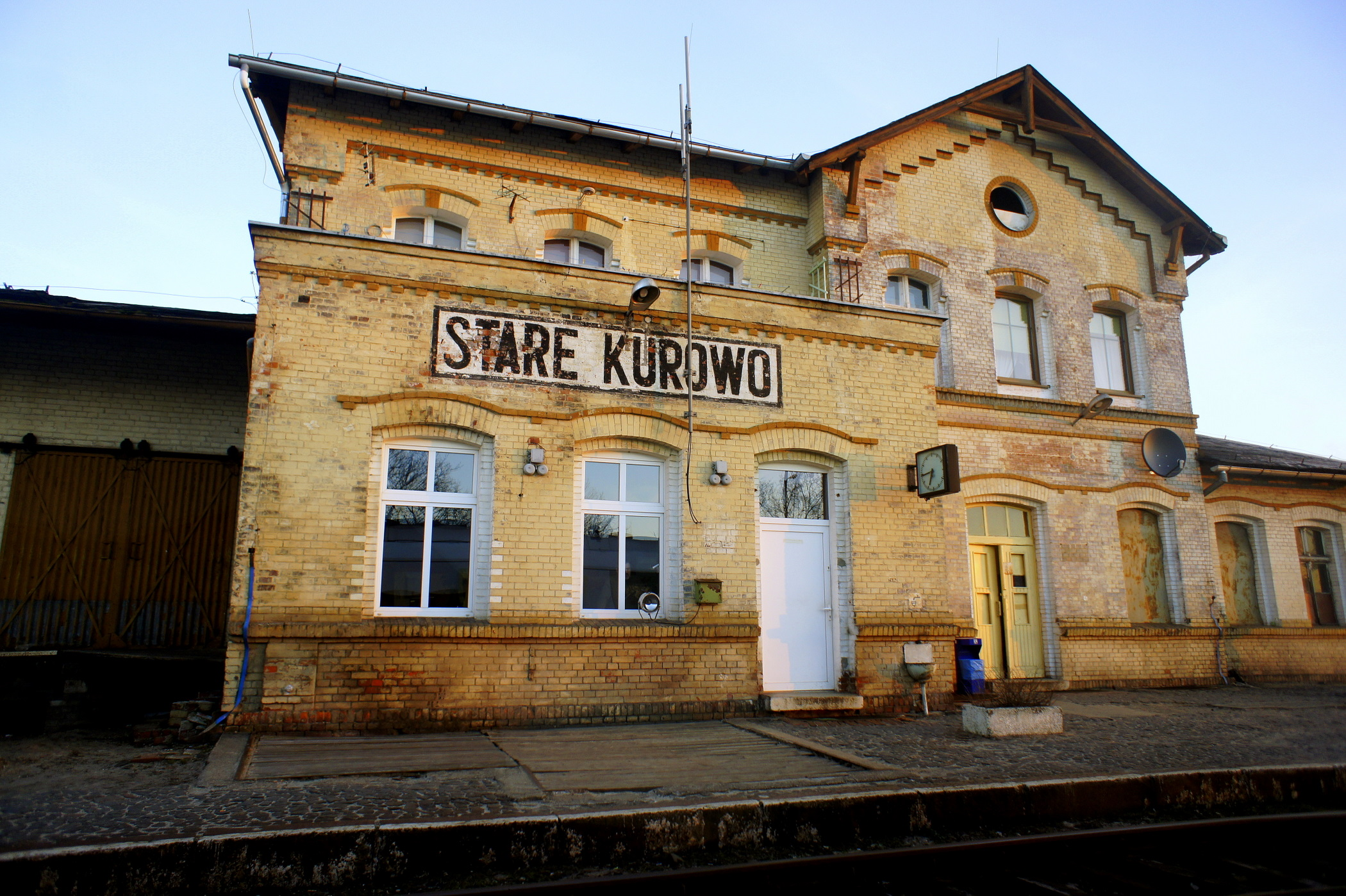 Stacja kolejowa w Starym Kurowie